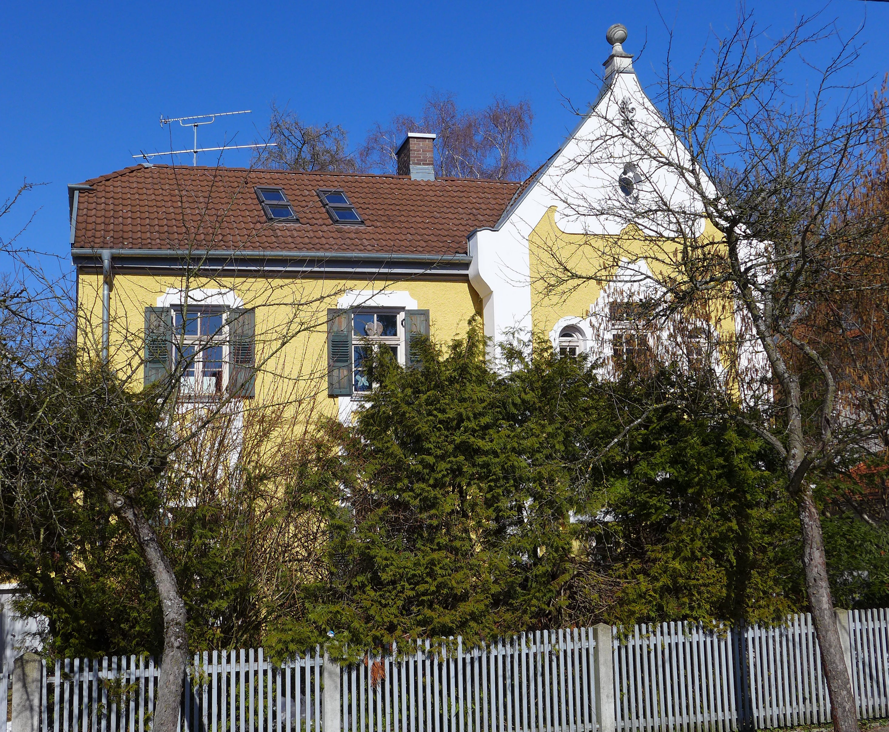 Hofmillerstr 32, München